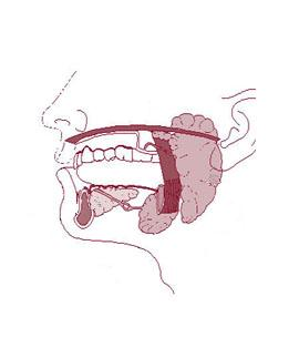 Ohrspeicheldrüse, Glandula_sublingualis, Glandula_submandibularis